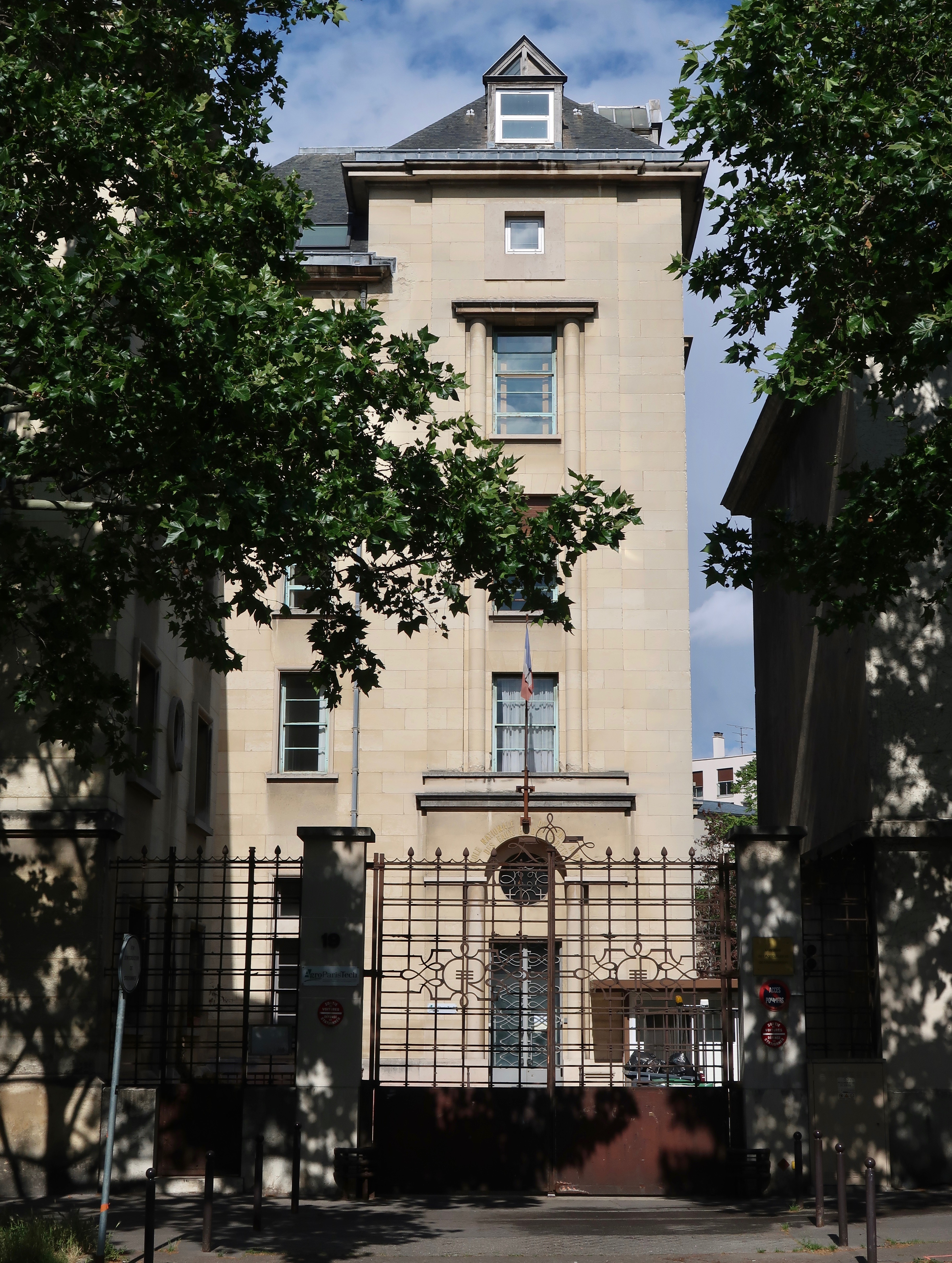 19 avenue du Maine (Paris, 15e).